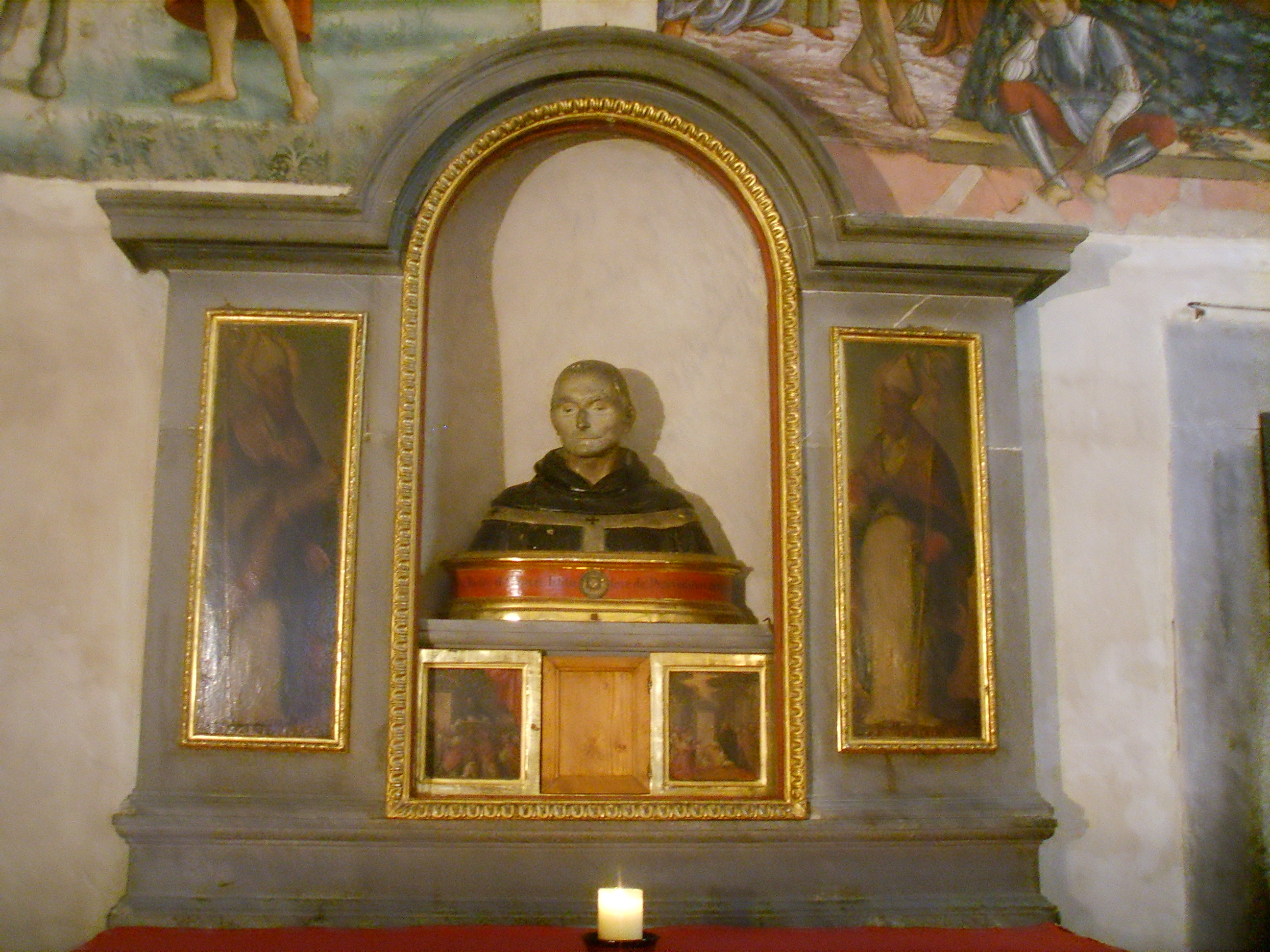 Oratorio_dei_buonomini_di_san_martino in Florence, italy